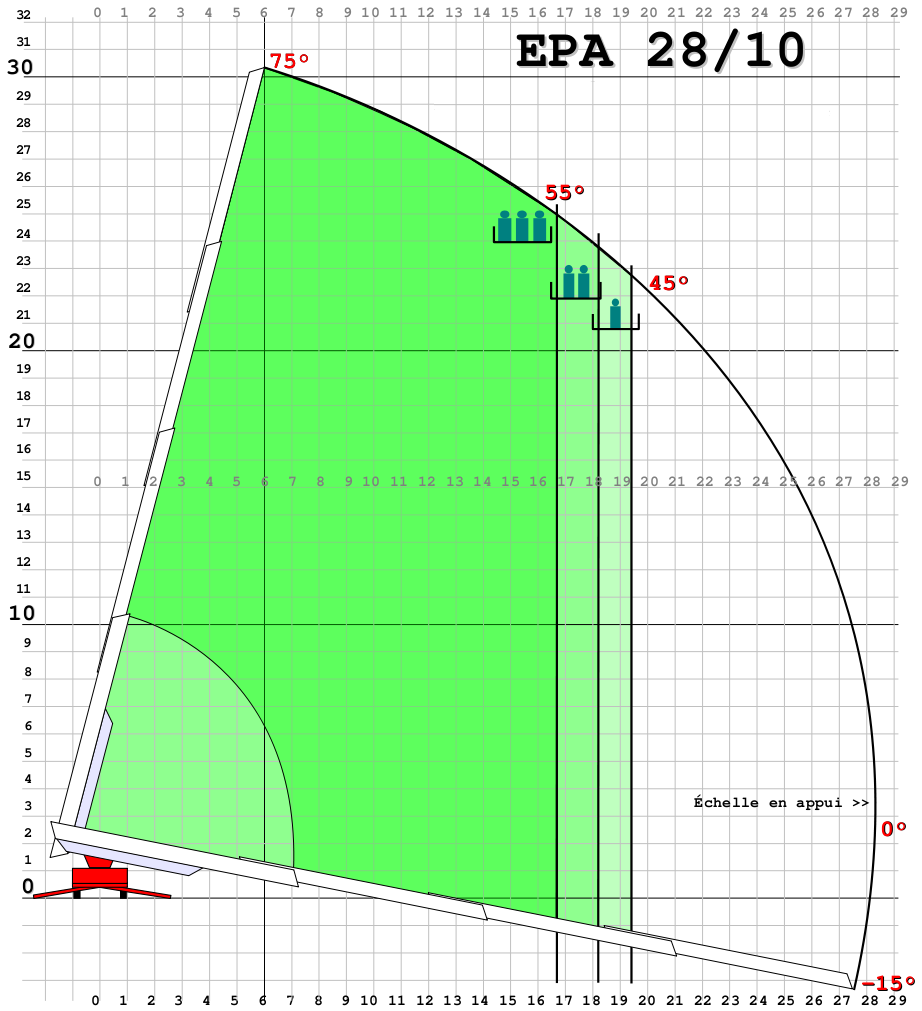 Grille de calcul de portée pour une EPA camiva 28/10